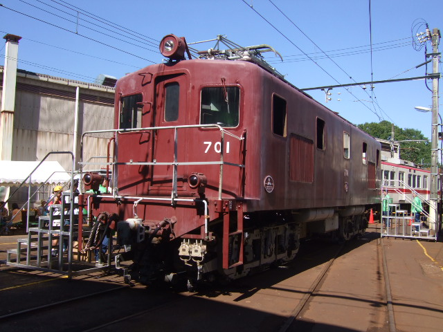 神戸電鉄 700形電気機関車701号（2007年10月6日・鈴蘭台工場一般公開時）